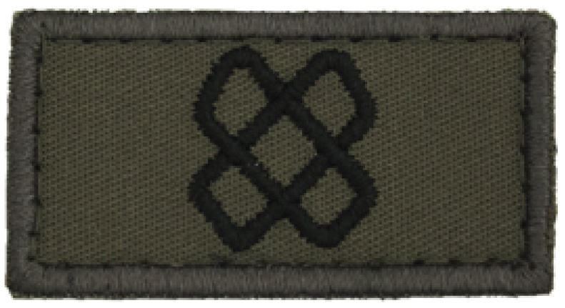 Logistik